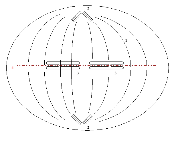 fuseau mitotique de cellule en division Schéma dessiné par Utilisateur:Teuteul d'après cours d'université; libre de droit.